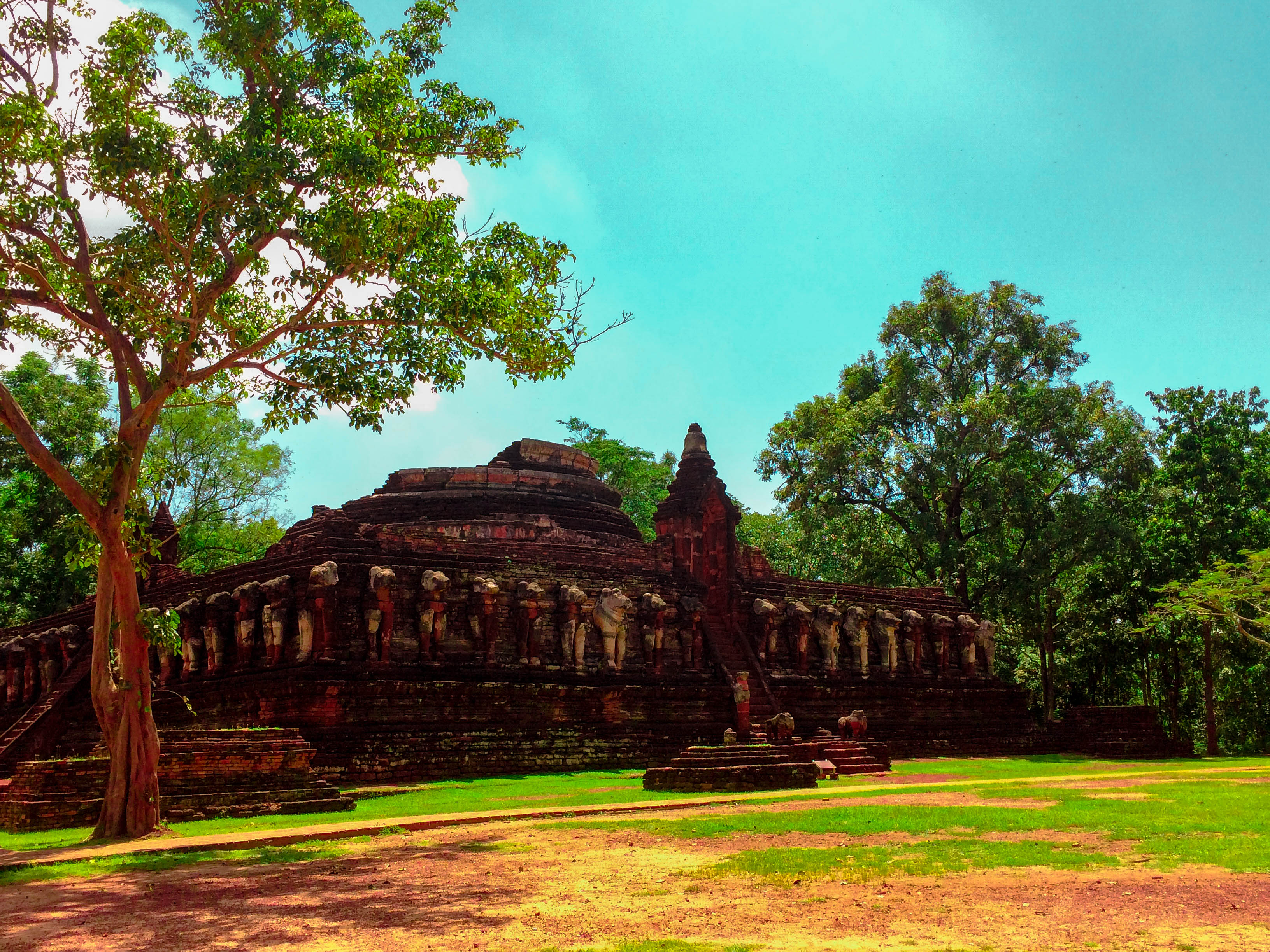 วัดช้างรอบ